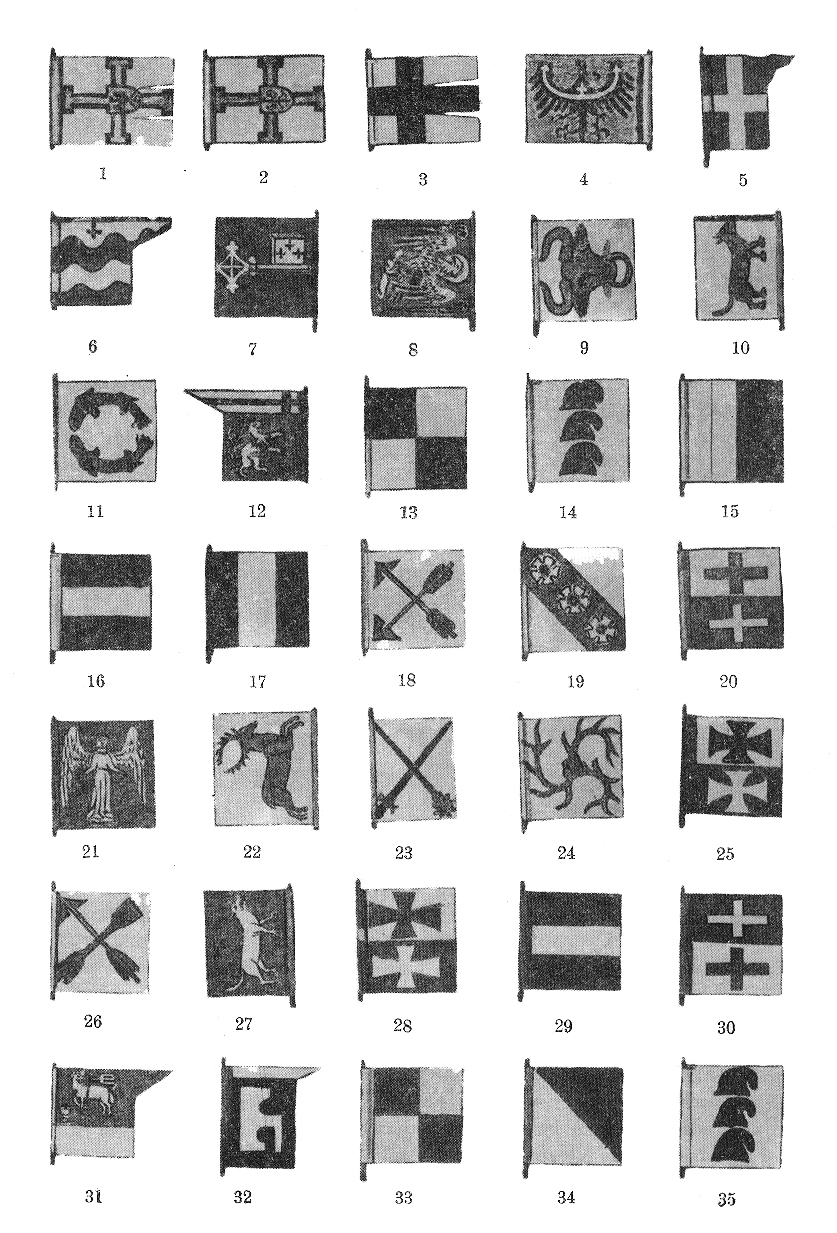 "Chorągwie krzyżackie zdobyte przez Wł. Jagiełłę r. 1410 pod Grunwaldem i Koronowem oraz na kawalerach inflanckich r. 1431 pod Nakłem"